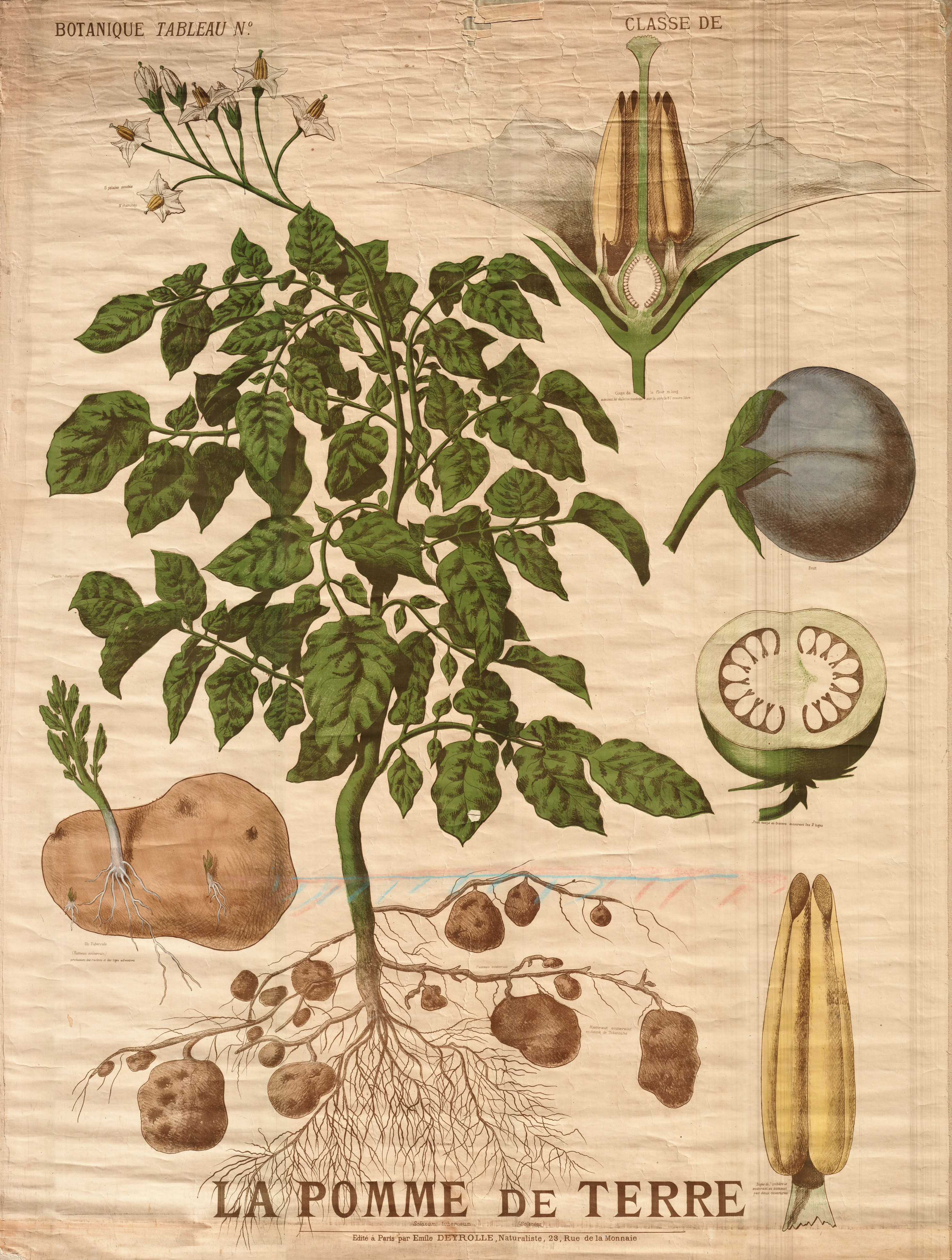 La pomme de terre. Bibliothèque Numérique de l'Université d'Artois. Retrieved on 25 March 2016.